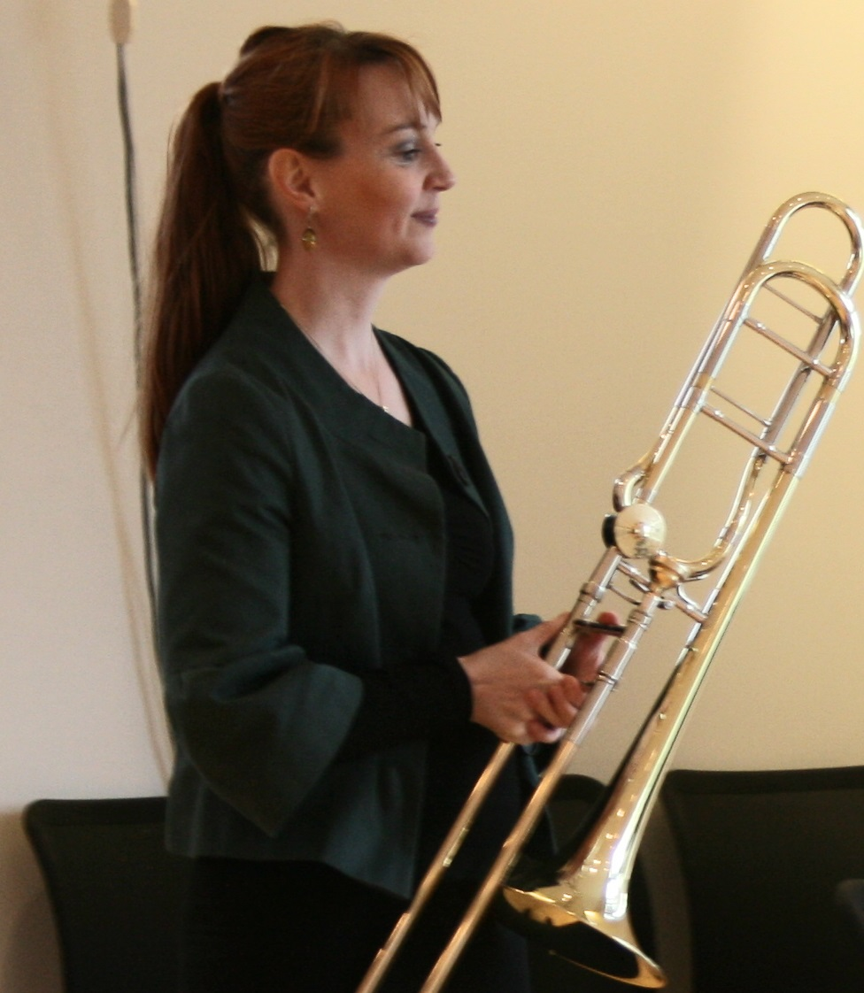 Ingibjörg Azima Guðlaugsdóttir